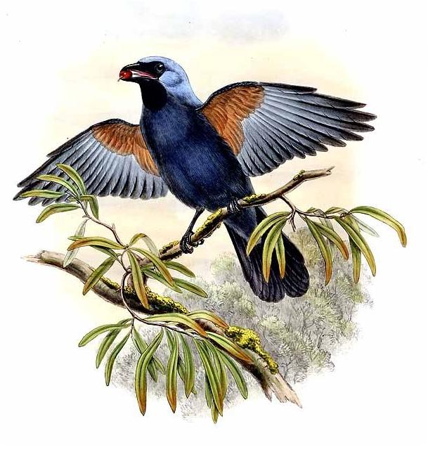 Échenilleur à gros bec (Coracina caeruleogrisea)